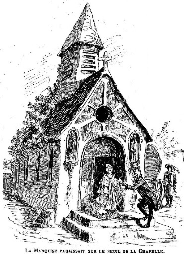 La chapelle de Lothéa dessinée en 1907 (illustration d'une nouvelle de Léon de Tinseau intitulée "Maître Gratien" publiée dans "Le journal du dimanche" du 31 mars 1907).